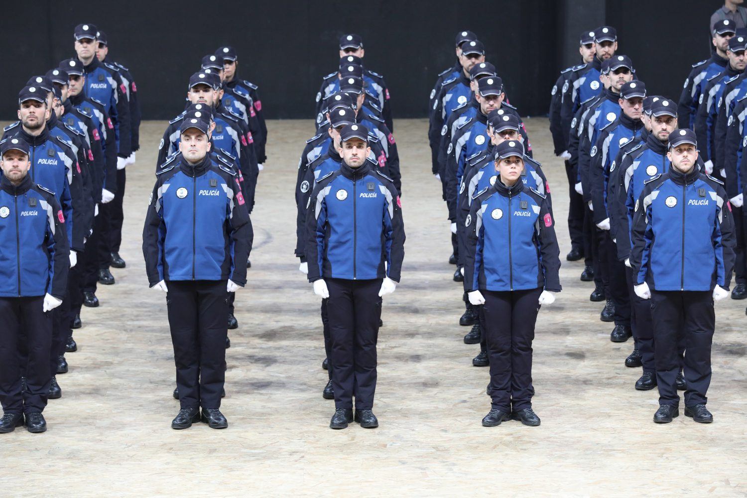 Manuela Carmena y Javier Barbero reciben a la nueva promoción de Policía Municipal Son un total de 116 hombres y 21 mujeres, pertenecientes a la 49ª promoción Tras la entrega de nombramientos se ha celebrado un homenaje a los compañeros caídos en acto de servicio. 15/11/2018 La alcaldesa de Madrid, Manuela Carmena, y el delegado del Área de Salud, Seguridad y Emergencias, Javier Barbero, han dado la bienvenida este mediodía a las y los agentes de la promoción número 49 del cuerpo de Policía Municipal. Se trata de 116 hombres y 21 mujeres que han superado el proceso selectivo, tanto de la oposición como del posterior periodo académico y que han recibido su nombramiento y han realizado el acatamiento a la Constitución.